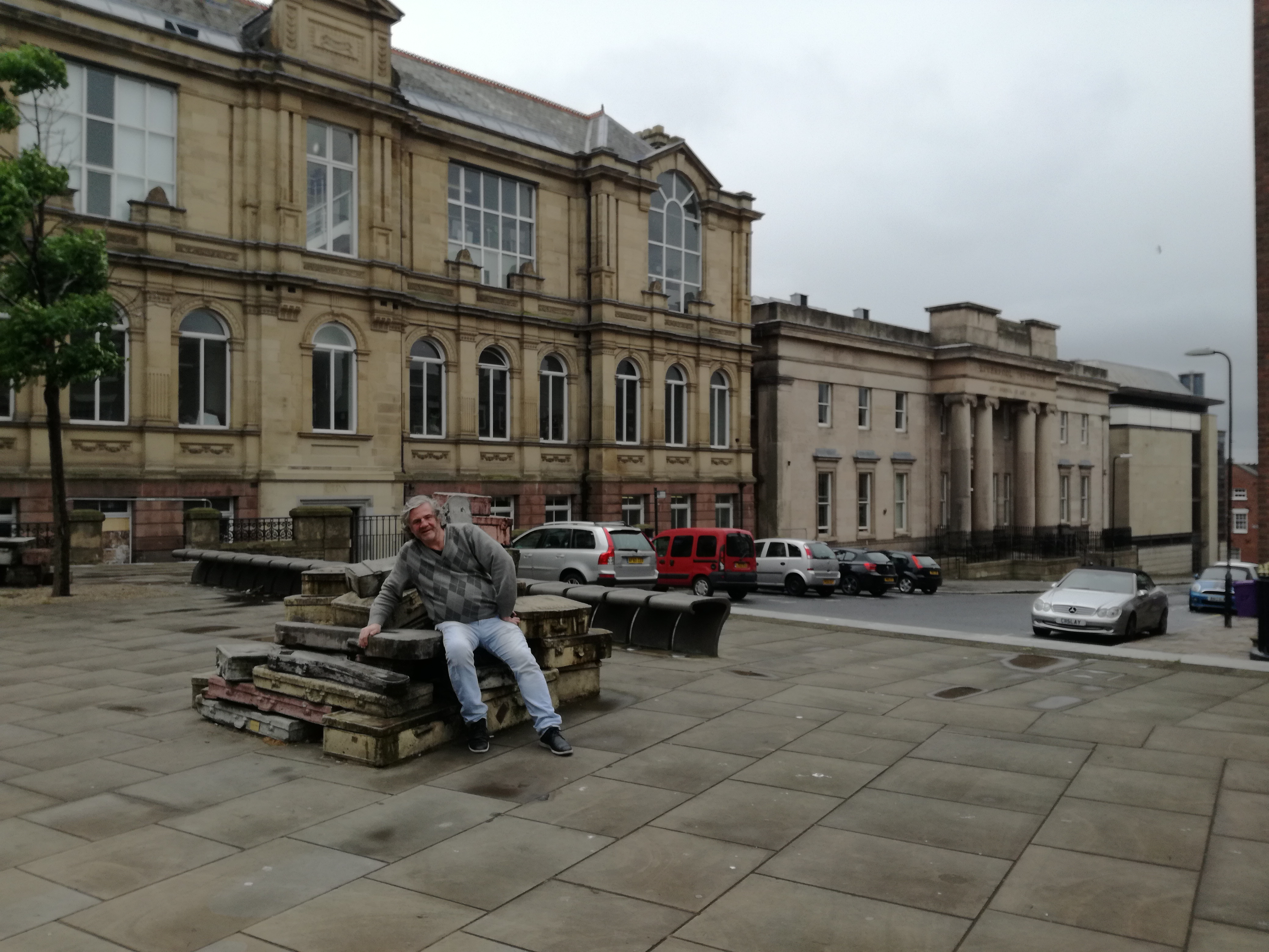 Liverpool. Georgian Quarter. Hope St y Mount St. En primer plano está el conjunto escultural llamado "A case of history", vulgarmente conocido también como "Maletas de Hope Street" (Hope Street 'Suitcases'). Detrás, los dos edificios del Liverpool Institute for Performing Arts (LIPA). Anteriormente, el edificio de la izquierda (más oscuro) era el Instituto de las Artes (donde estudió John Lennon) y el edificio de la derecha (más claro con una entrada con columnas) era el Liverpool Institute High School for Boys - Colegio Instituto de Liverpool para Chicos (donde estudiaron Paul McCartney y George Harrison).